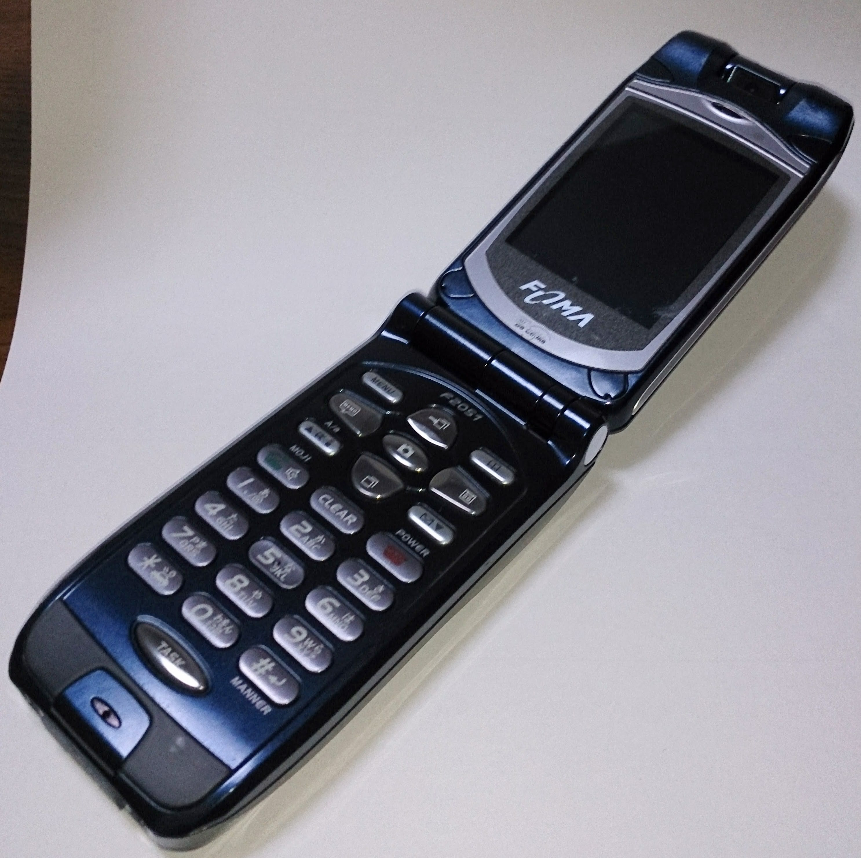 F2051